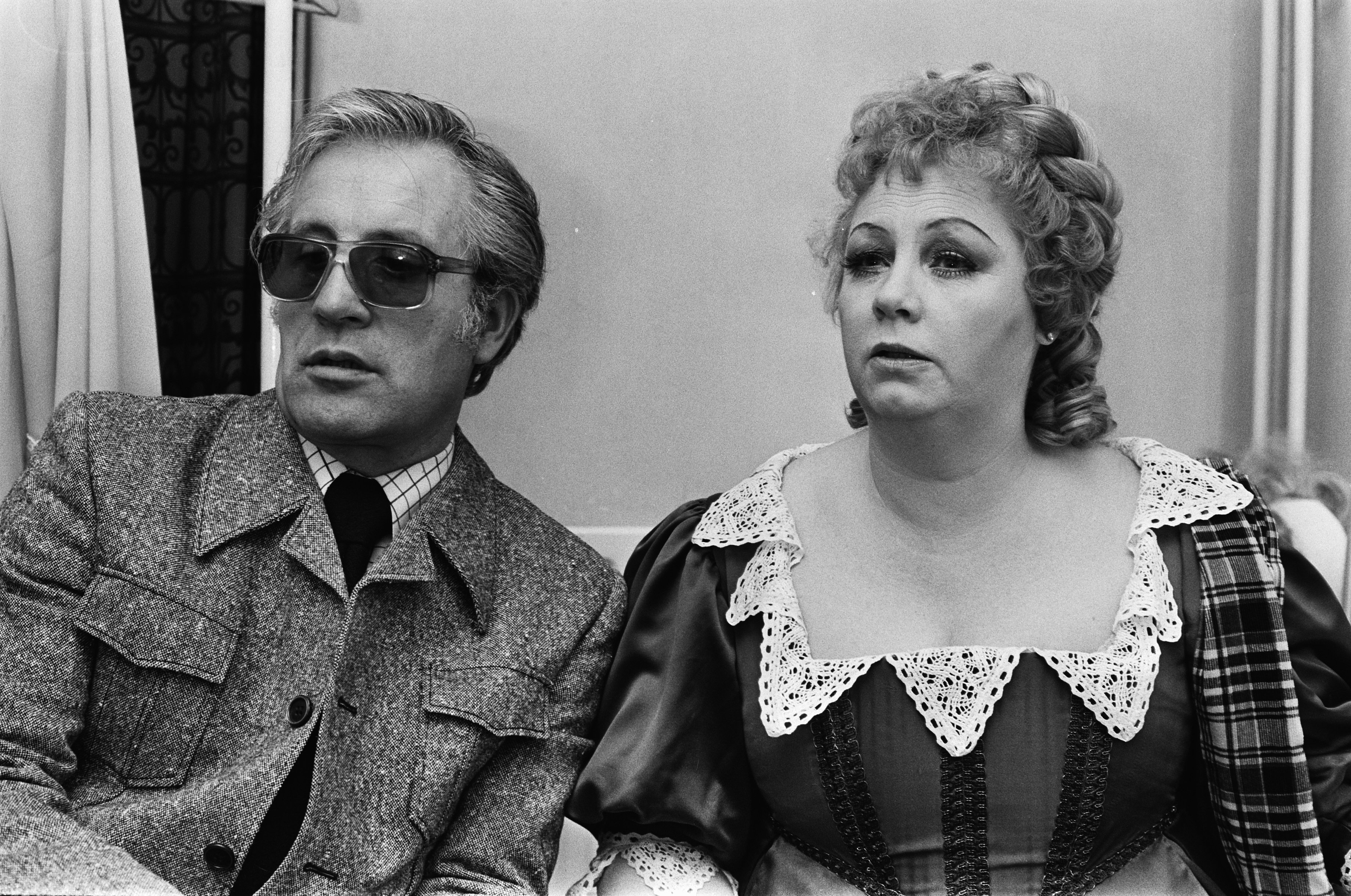 Collectie / Archief : Fotocollectie Anefo Reportage / Serie : De sopraan Christina Deutekom en haar man Beschrijving : De sopraan Christine Deutekom in een opera kostuum en haar man Annotatie : Kostuum waarschijnlijk van de opera Lucia di Lammermoor Datum : 5 december 1979 Trefwoorden : echtparen, kostuums, opera's, zangers Persoonsnaam : Deutekom, Cristina Fotograaf : Bogaerts, Rob / Anefo, [onbekend] Auteursrechthebbende : Nationaal Archief Materiaalsoort : Negatief (zwart/wit) Nummer archiefinventaris : bekijk toegang 2.24.01.05 Bestanddeelnummer : 930-5726 Reacties Geplaatst door Amsterdammertje op 22 juni 2015 - 15:18. Persoonsnamen: Deutekom, Jaap